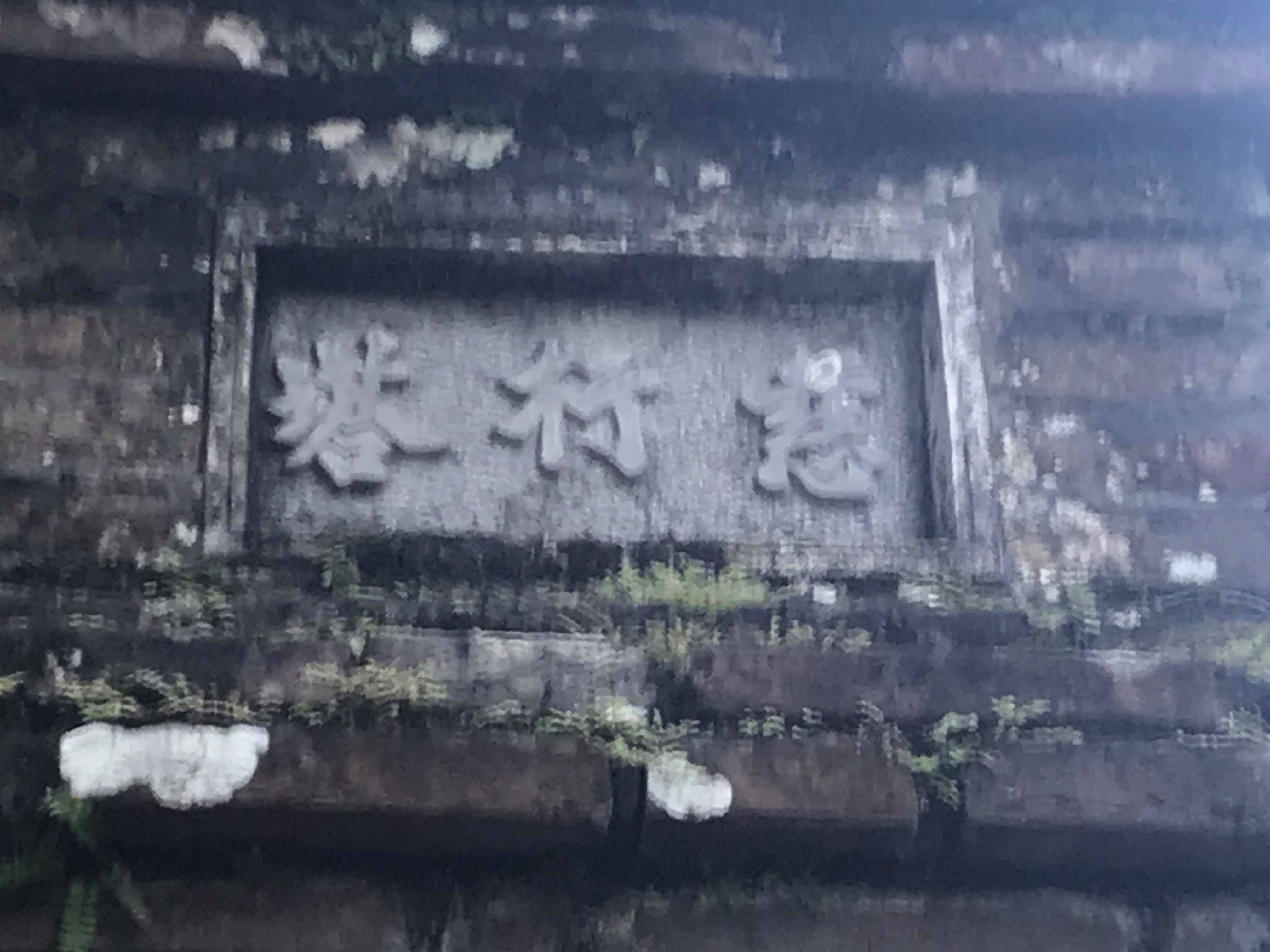 Đây là những Hán tự được khắc trên một ngôi mộ nằm ở bên phải của chùa Hạ. Ba Hán tự phiên âm là Tháp Hành Từ.